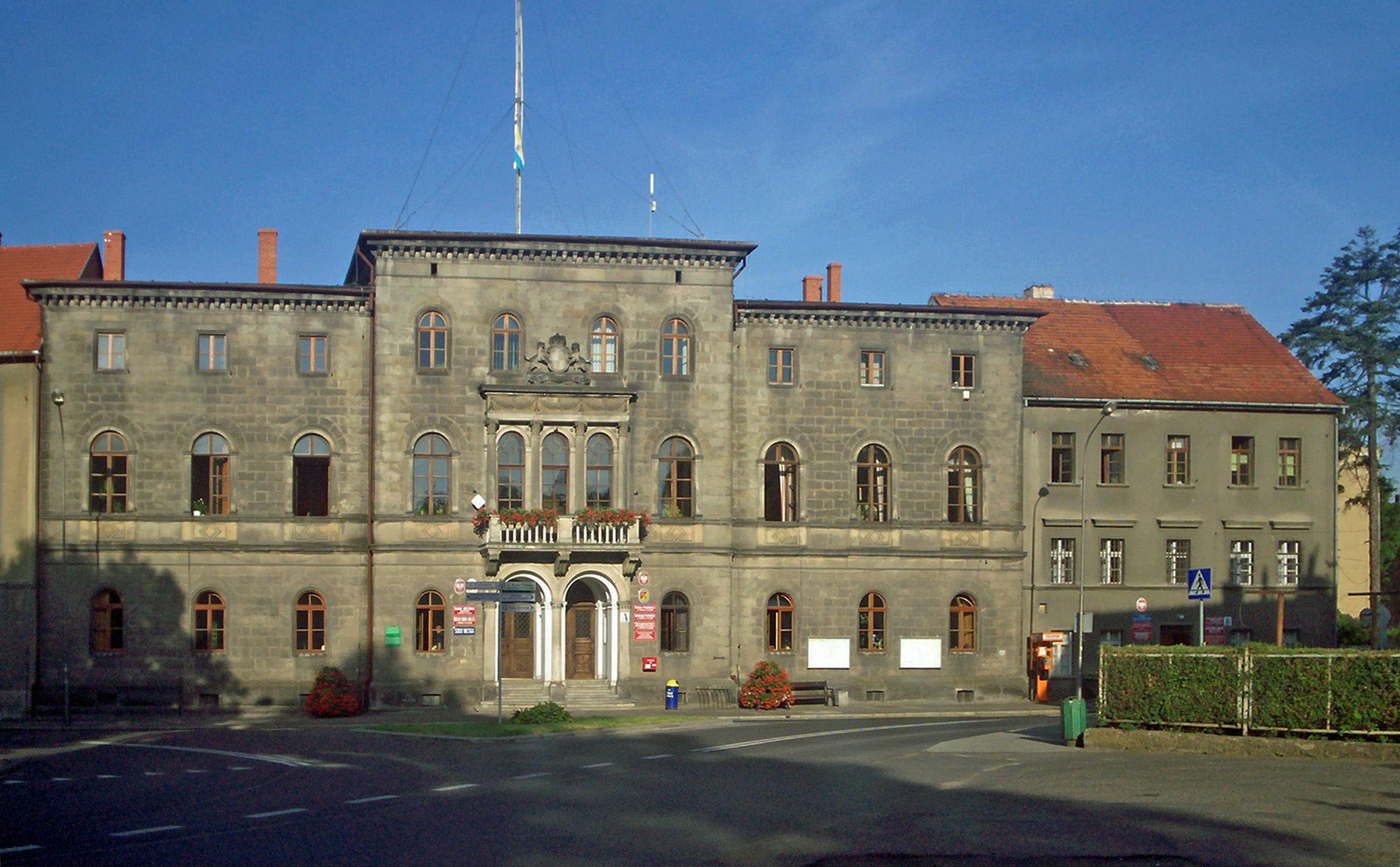 Lwówek Ślaski, klasycystyczny pałac Hohenzollernów z poł. XIX w. (siedziba władz miejskich i powiatowych).